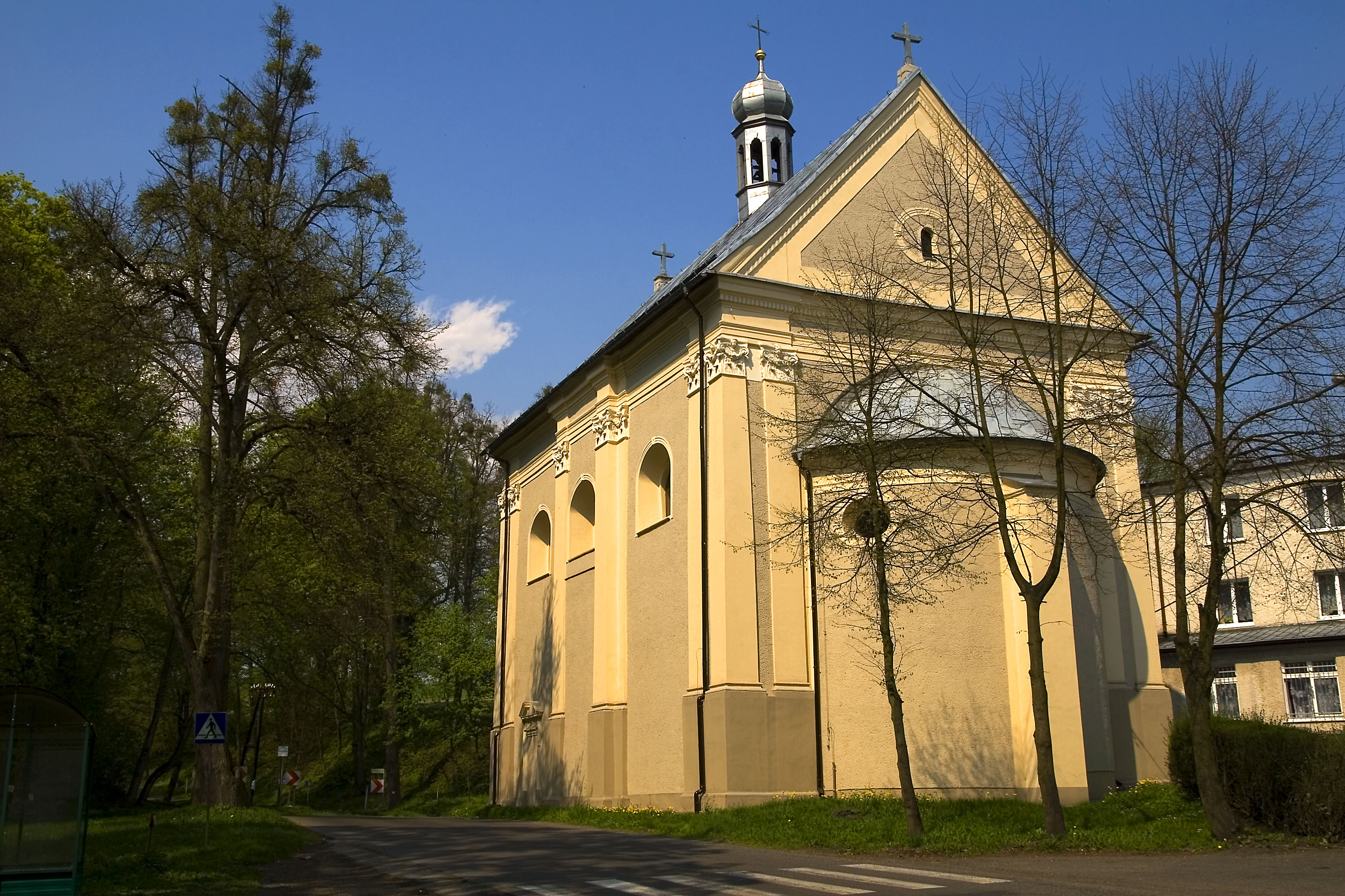 Góra św. Anny, kościół Matki Boskiej Wniebowziętej. Gmina Leśnica, powiat strzelecki